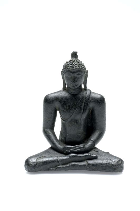 Beeld. Deze zittende Boeddha heeft de handen in de schoot in 'dhyanamudra' gevouwen, het gebaar van meditatie. Hij draagt een dunne doek over de linkerschouder. Op zijn hoofd zitten grote en ronde krullen. Het beeld heeft niet de gebruikelijke uitstulping (usnisa), symbool voor Verlichting, maar een vlam die uit de kruin komt. Dit bronzen beeld werd vermoedelijk vanuit Sri Lanka naar Sumatra geëxporteerd, waar hij werd gevonden in de hoofdtempel van Pamutung, Padang Lawas.. Bronzen boeddhabeeld Unknown language: Amitabha